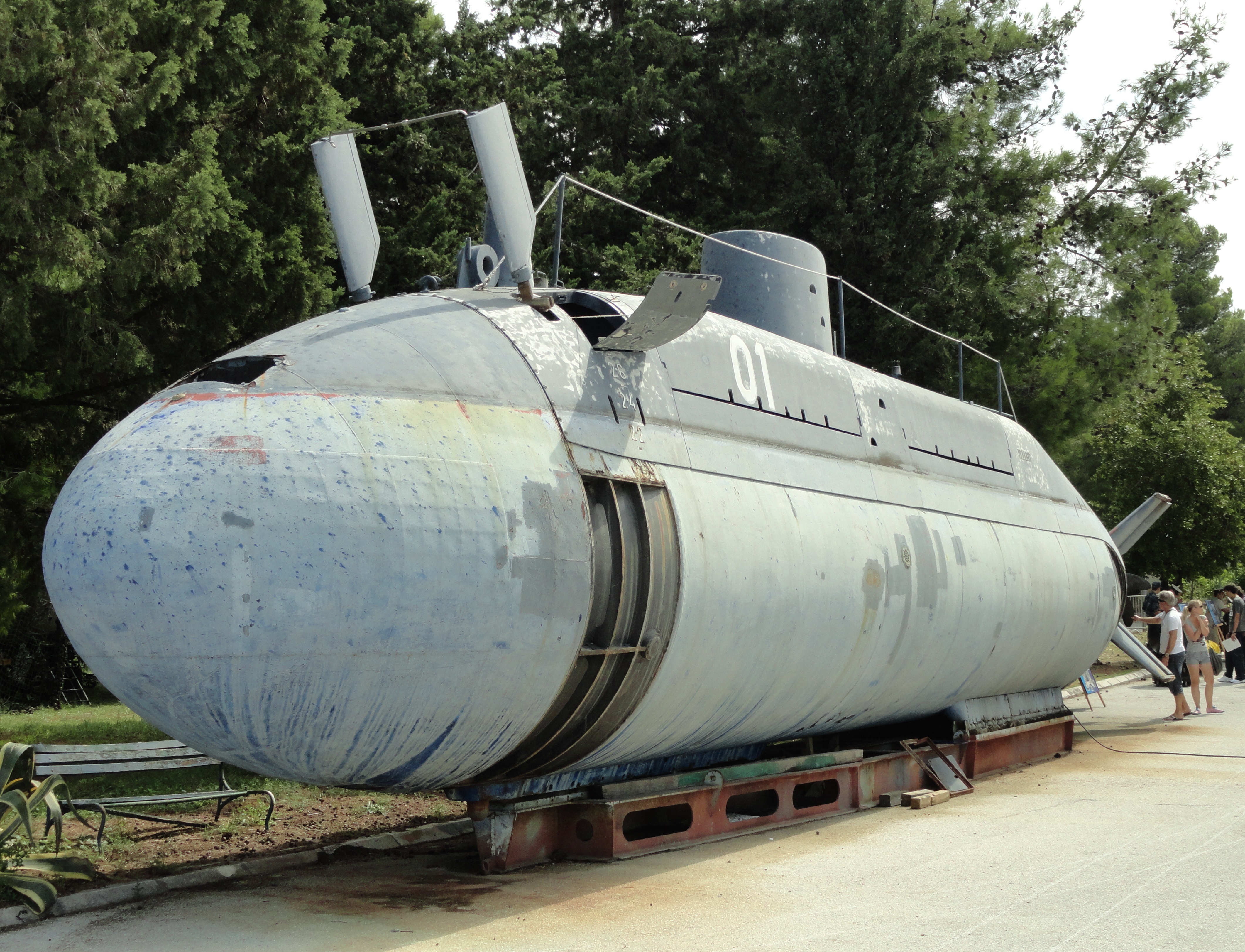 P-01 Velebit u Lori na suhome.